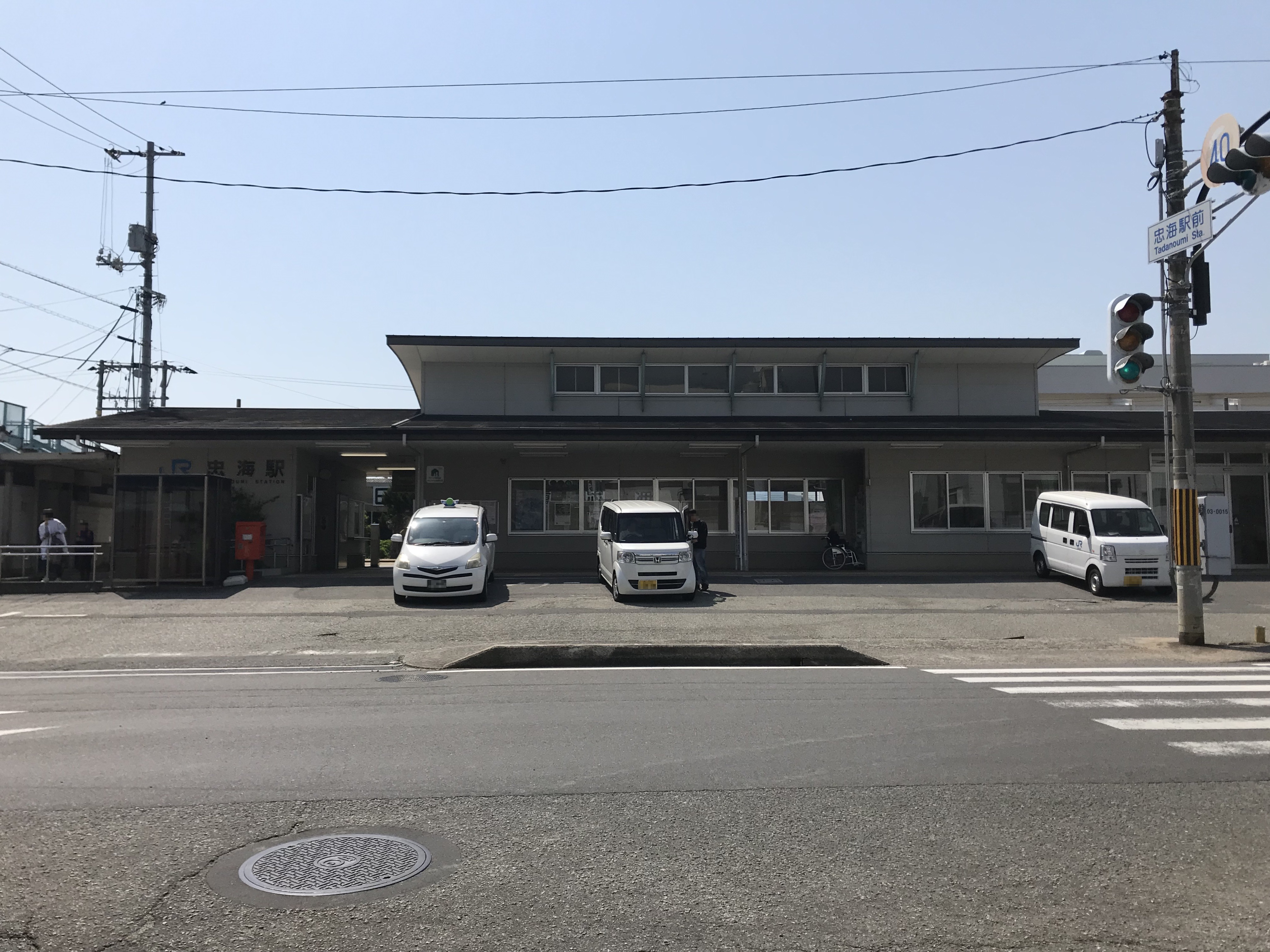 忠海駅の駅舎